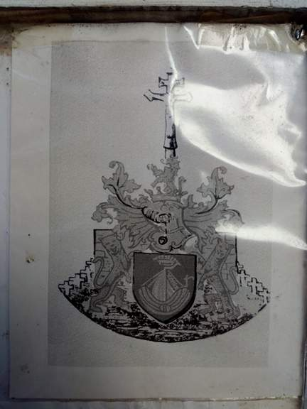 blason/armoiries de la commune de Maissin (avant fusion 1977)